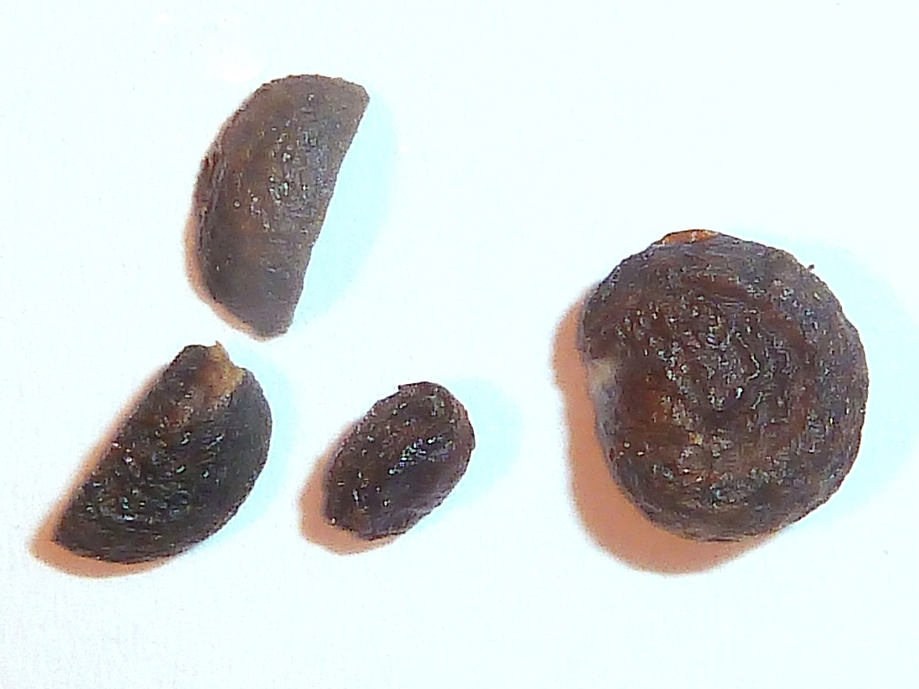 Pimienta racemosa (Malaguetta, bay-rum) . Semillas sueltas - Route de Clairière, Fort-de-France (Martinica, Caribe francés).